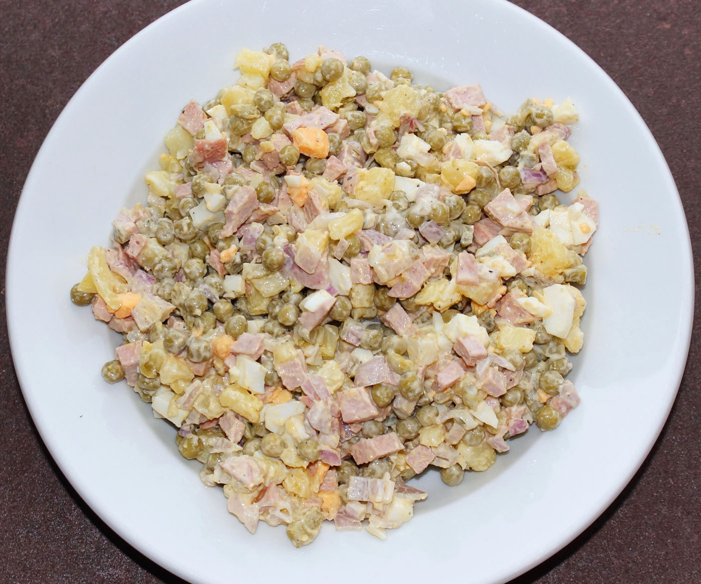 Zalot "Olivier" nom sowjetesche Standardrezept.